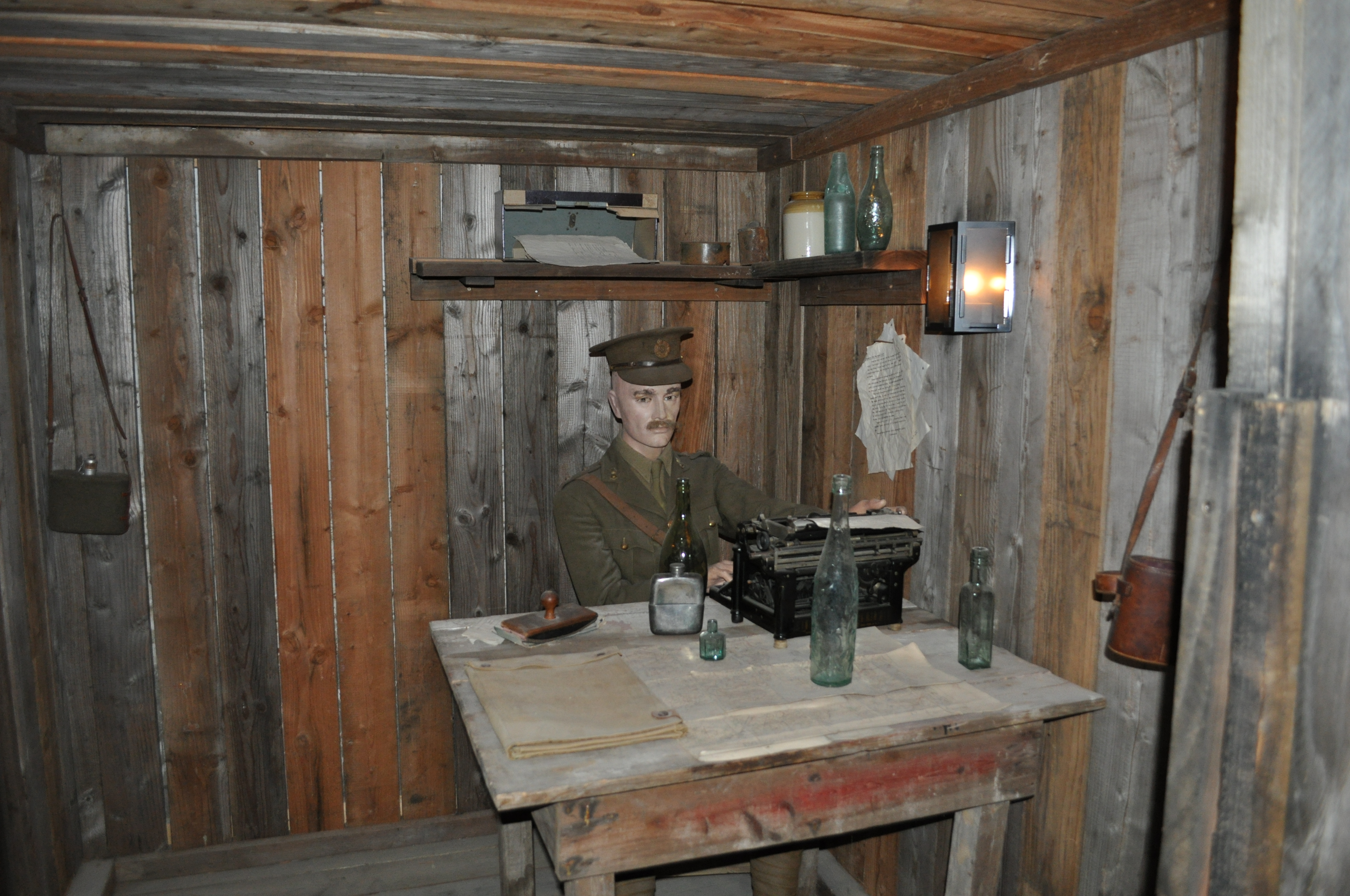 Memorial Museum Passchendaele 1917, kast met rekwisieten.